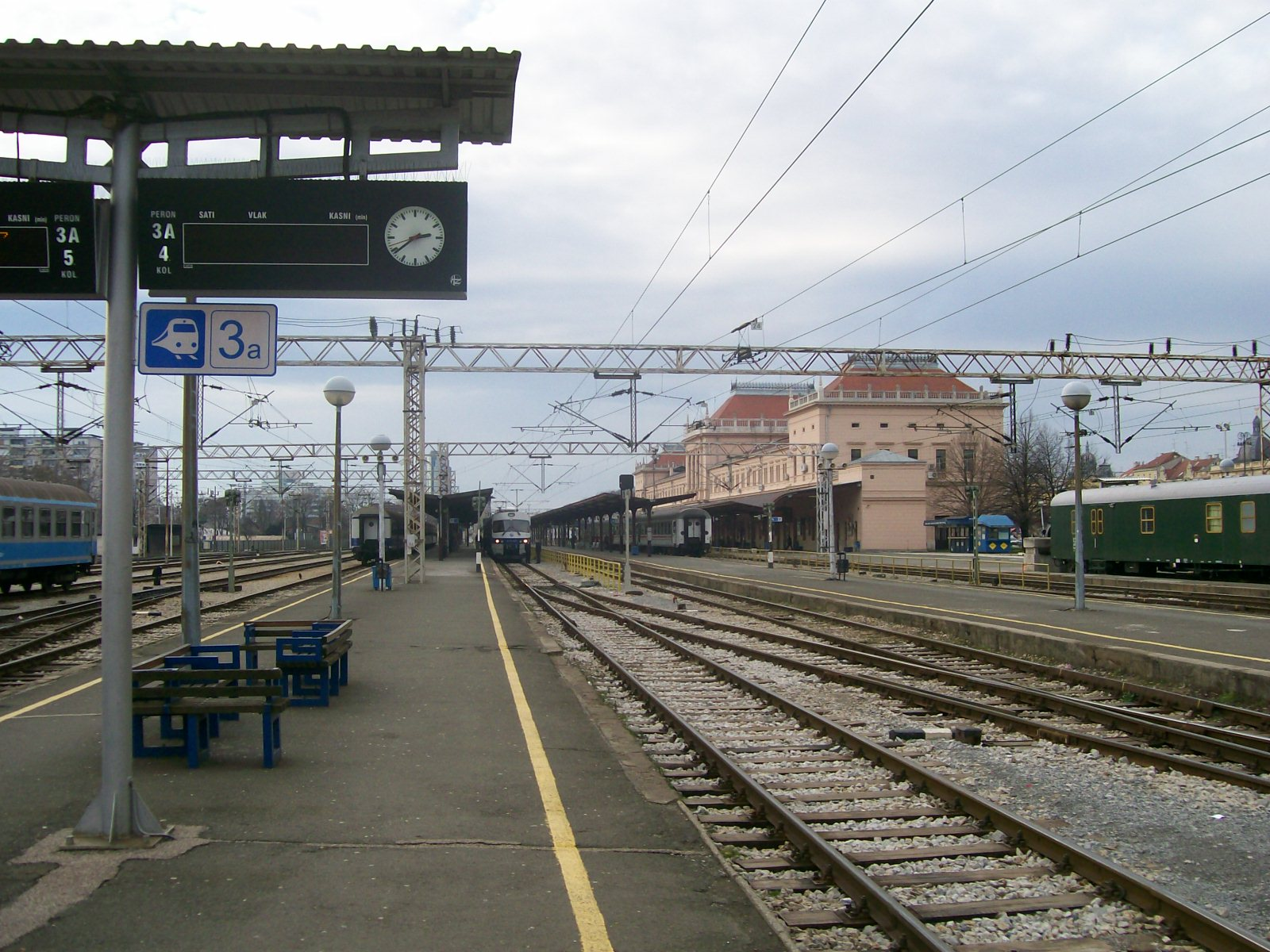 Zagrebački Glavni kolodvor.